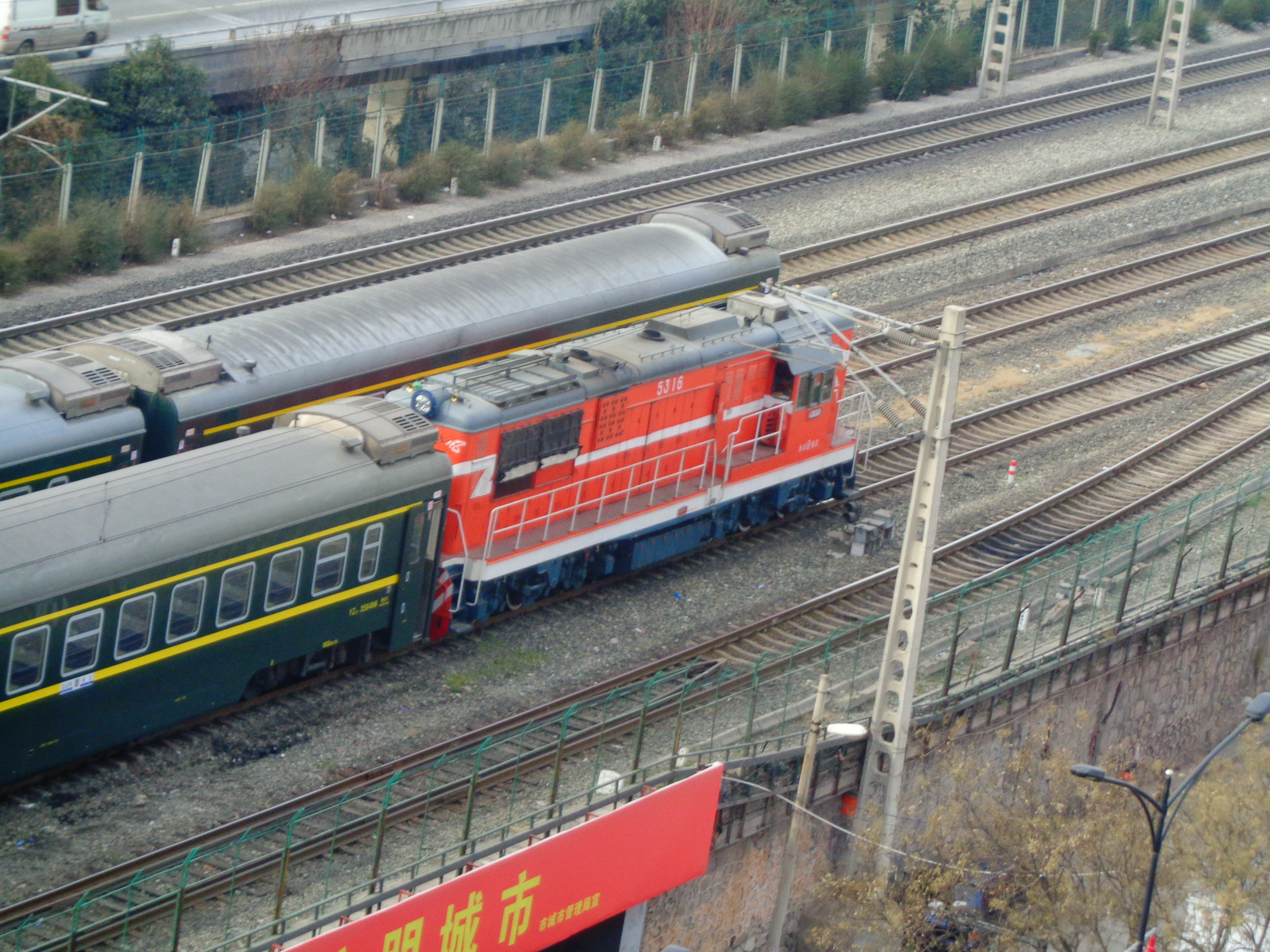 西安市新城区安远门前的陇海铁路，车来车往，有从正线进站或出站的，也有停在侧线上的车皮，也有两辆往来的东风调机单机通过或牵引车皮进出站。